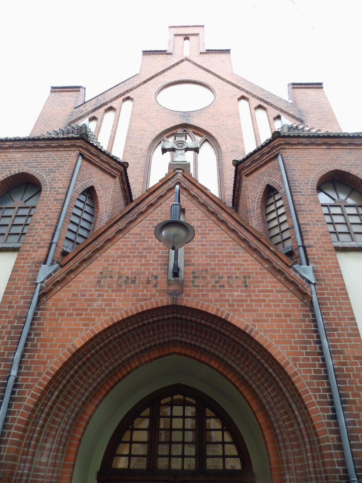 Portal der baptistischen Friedenskirche in Berlin-Charlottenburg, Bismarckstraße 14